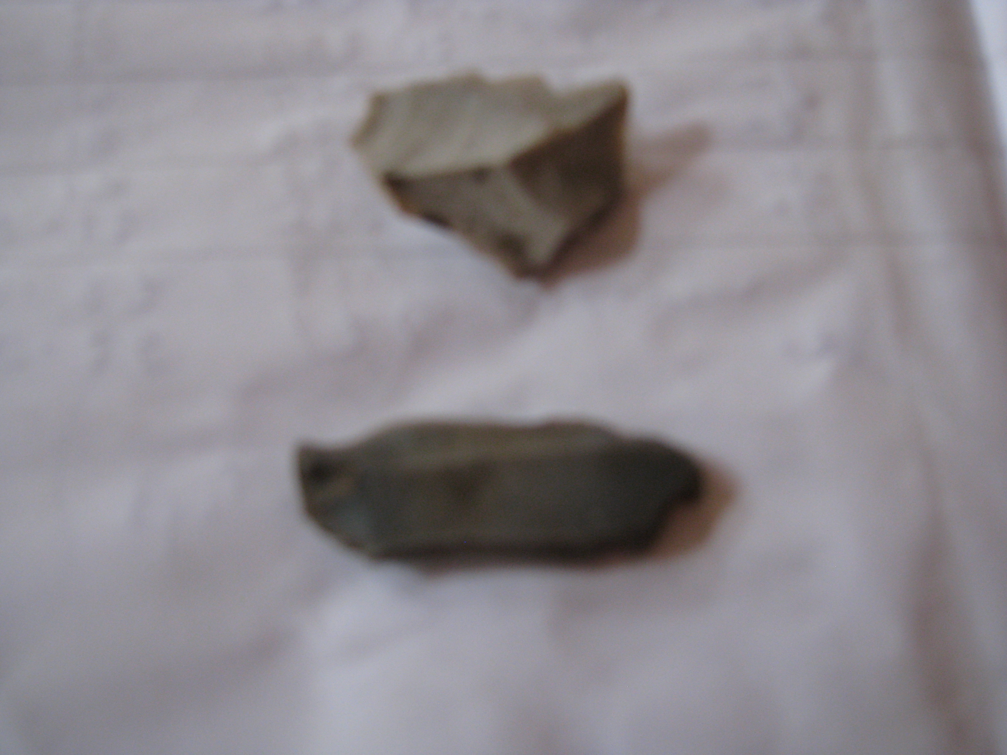 några flintbits flisor